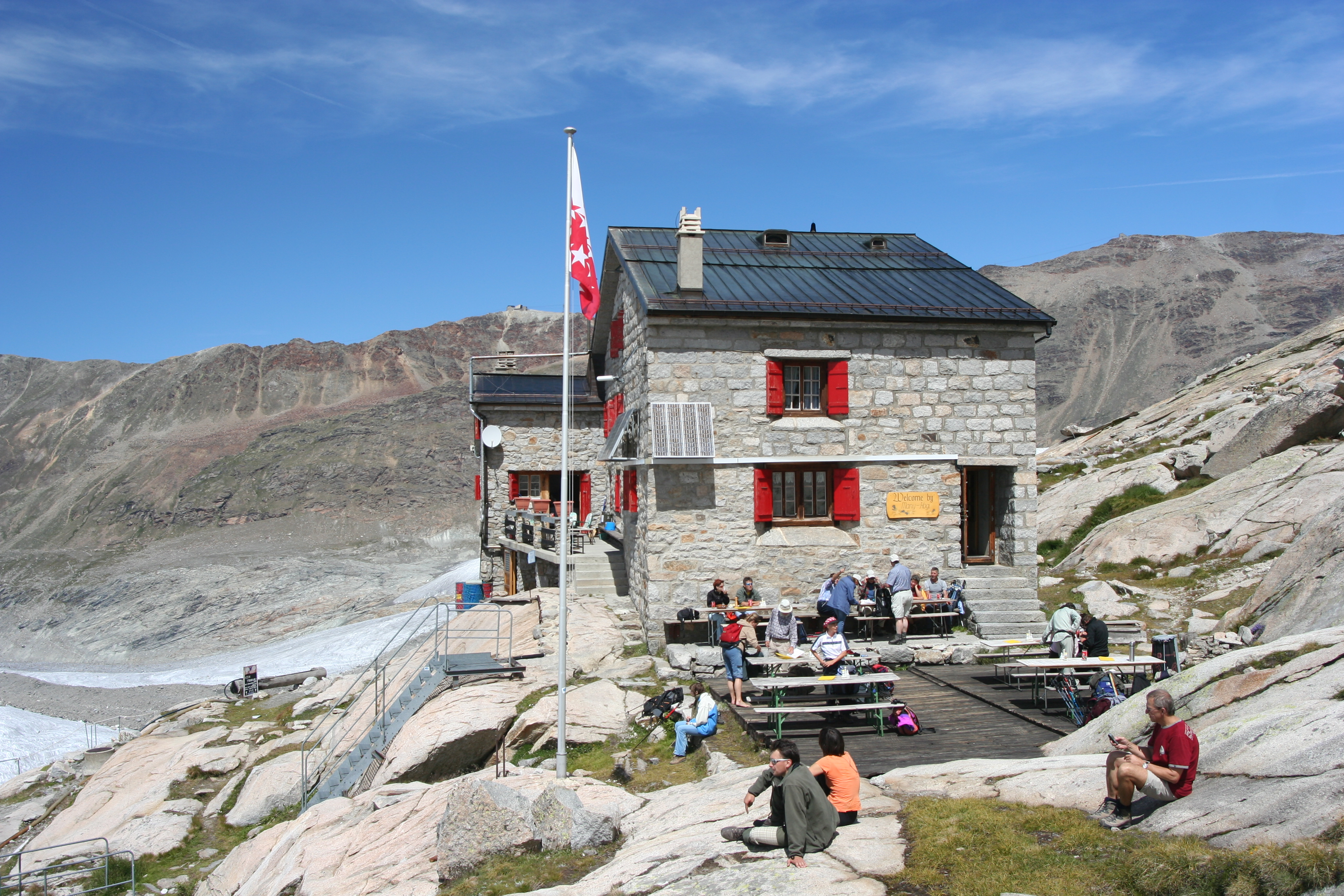 former Monte Rosa Hut (2795 metres).